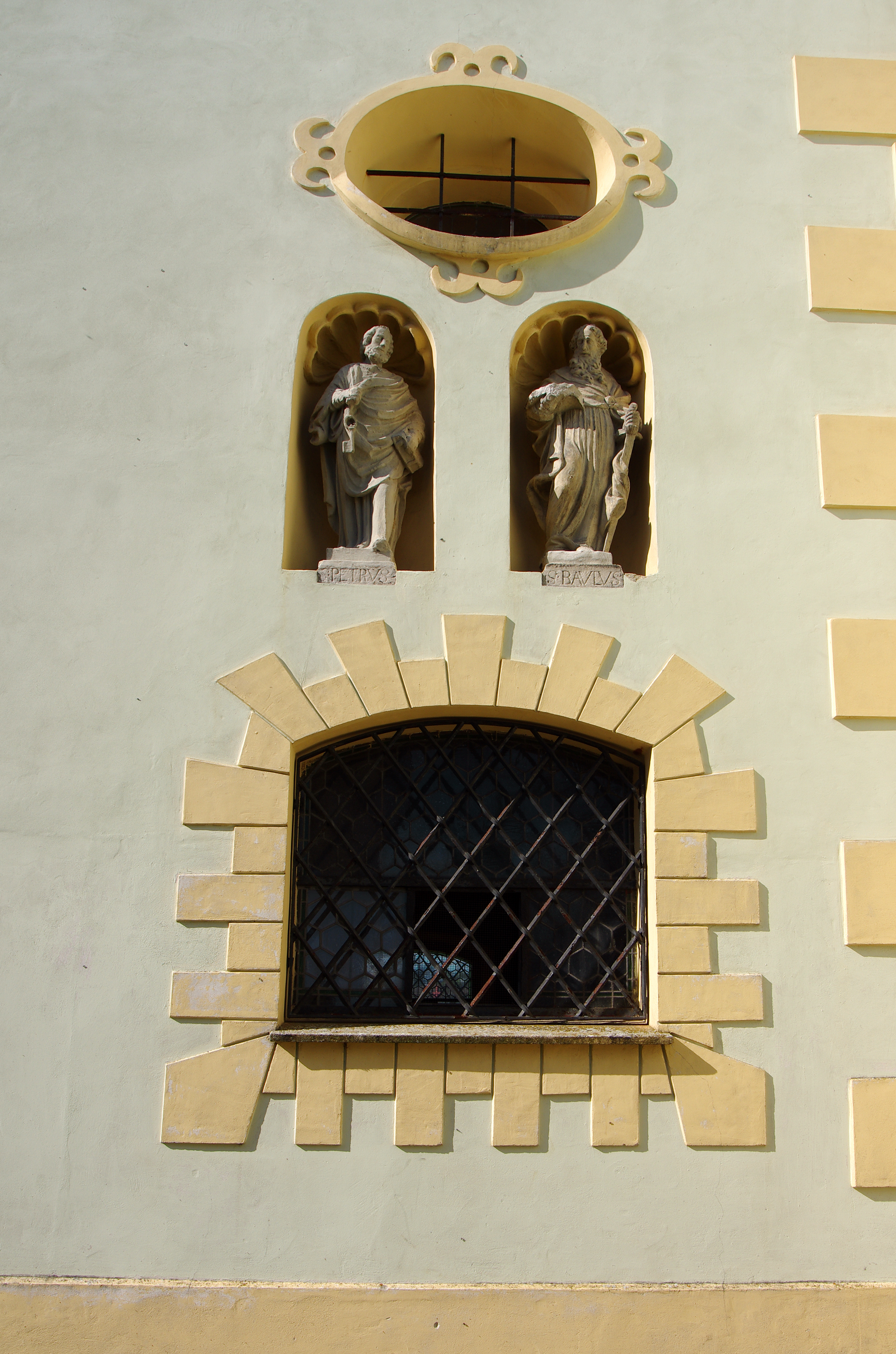 Kostel svatých Petra a Pavla, náměstí Karla IV., Krajková.